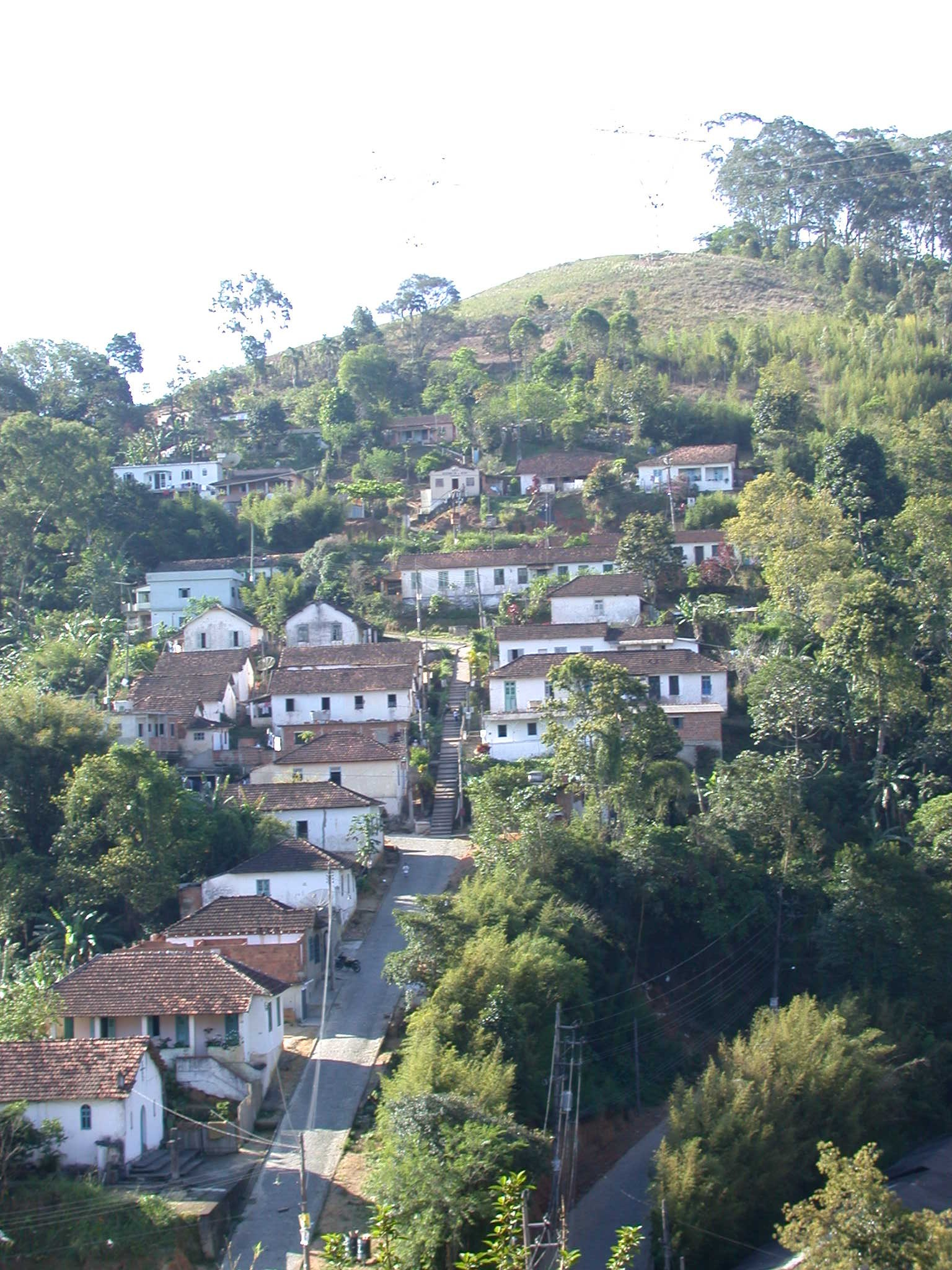 Foto da cidade de Engenheiro Paulo de Frontin no Estado do Rio de Janeiro